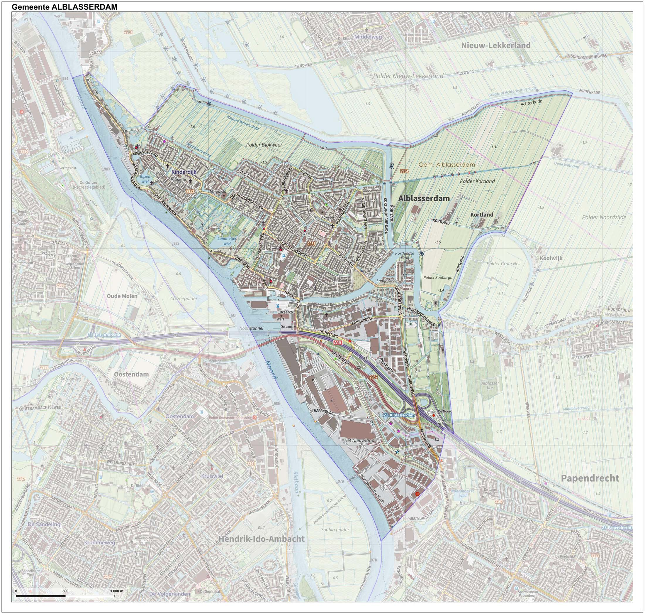 Topografische gemeentekaart. Resolutie: 400 pixels/km. Kaartbeeld samengesteld uit de open geodata van de Top10NL en Top25namen (Kadaster), Creative Commons-BY licentie. Gebouwvlakken uit open geodata BAG extract. Wegen uit de OpenStreetMap, OpenStreetMap community. Reliëfschaduw uit de Actuele Hoogtekaart AHN2. Samenstelling en kleurenschema: Jan-Willem van Aalst, met QGIS. Zie ook de Legenda.